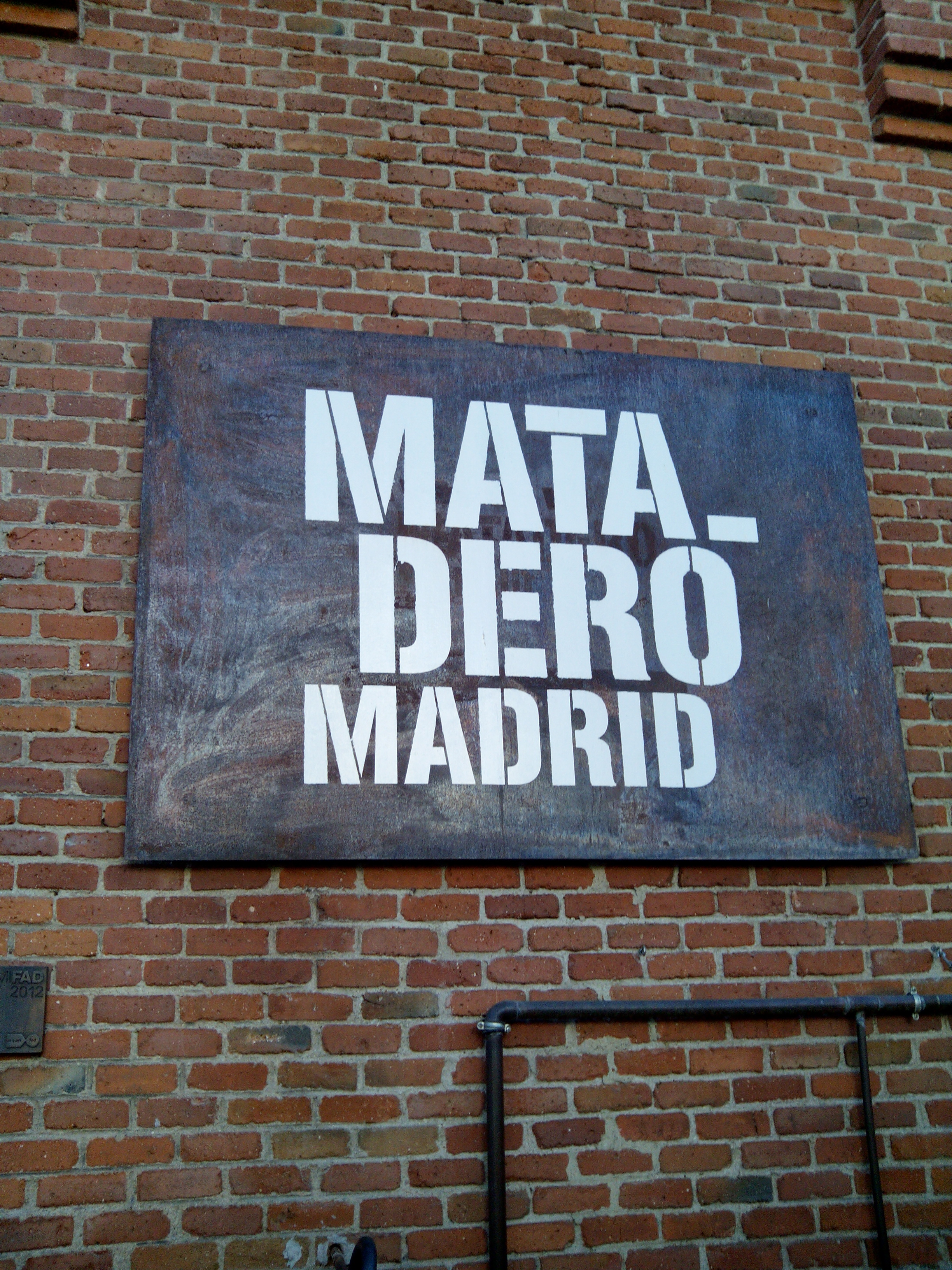 Matadero de Arganzuela, cartel.